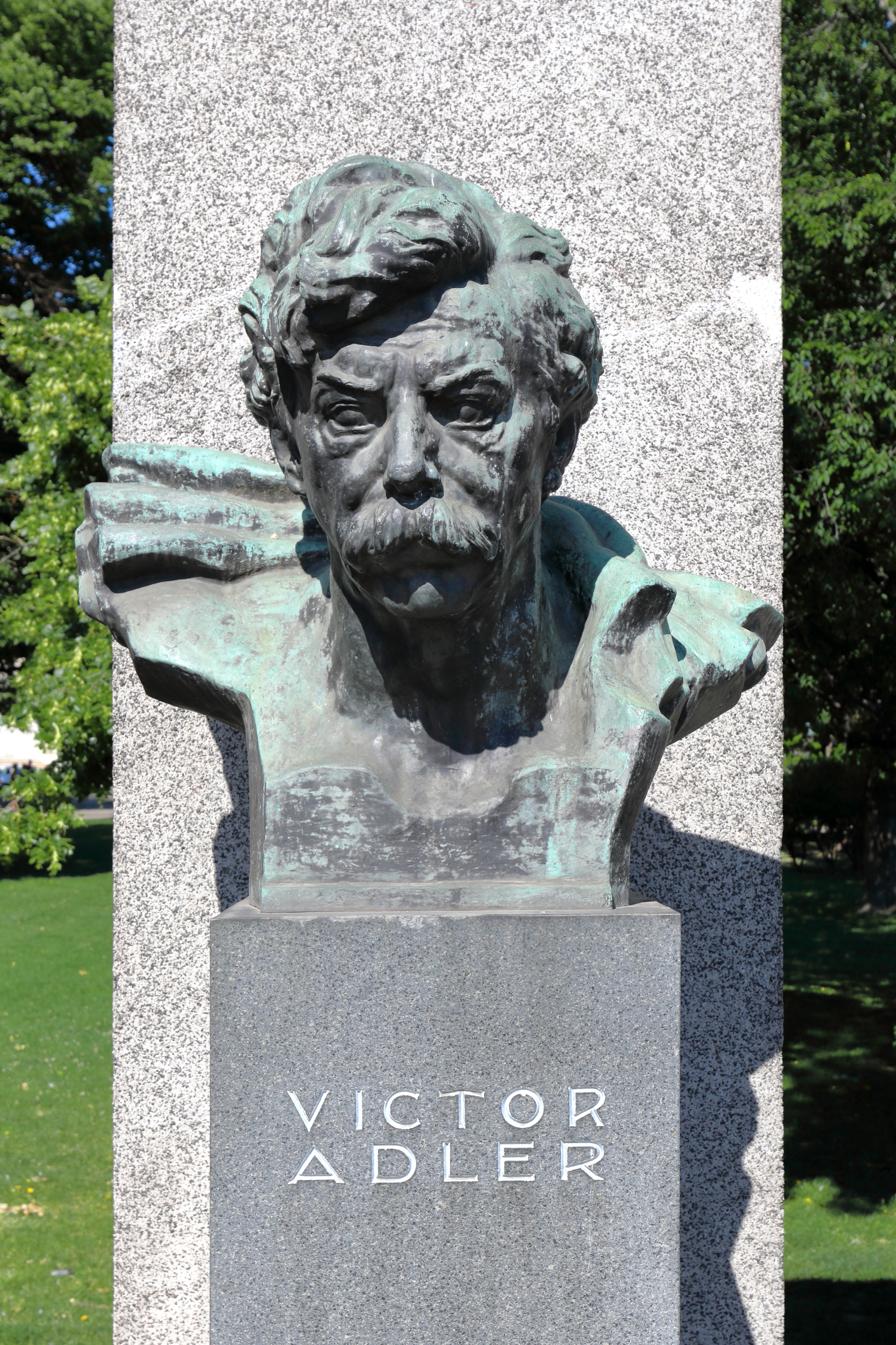 Die Büste Victor Adler am Dr.-Karl-Renner-Ring zwischen dem Parlamentsgebäude und Palais Epstein im 1. Wiener Gemeindebezirk Innere Stadt. Die Büste wurde von dem Bildhauer Anton Hanak gefertigt und ist ein Teil des am 12. November 1928 eingeweihten sozialistischen Denkmals der Republik.